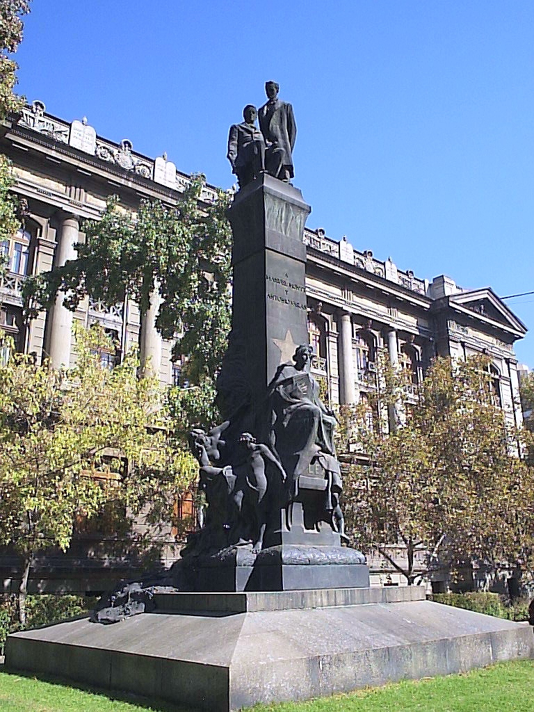 Estatua a Manuel Montt Torres y a Antonio Varas de la Barra, ubicada en el frontis del Palacio de los Tribunales de Justicia de Santiago